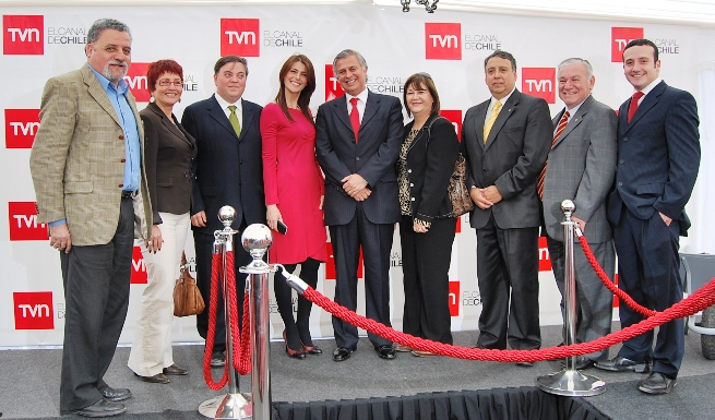 TVN elige Talcahuano para su nuevo edificio corporativo